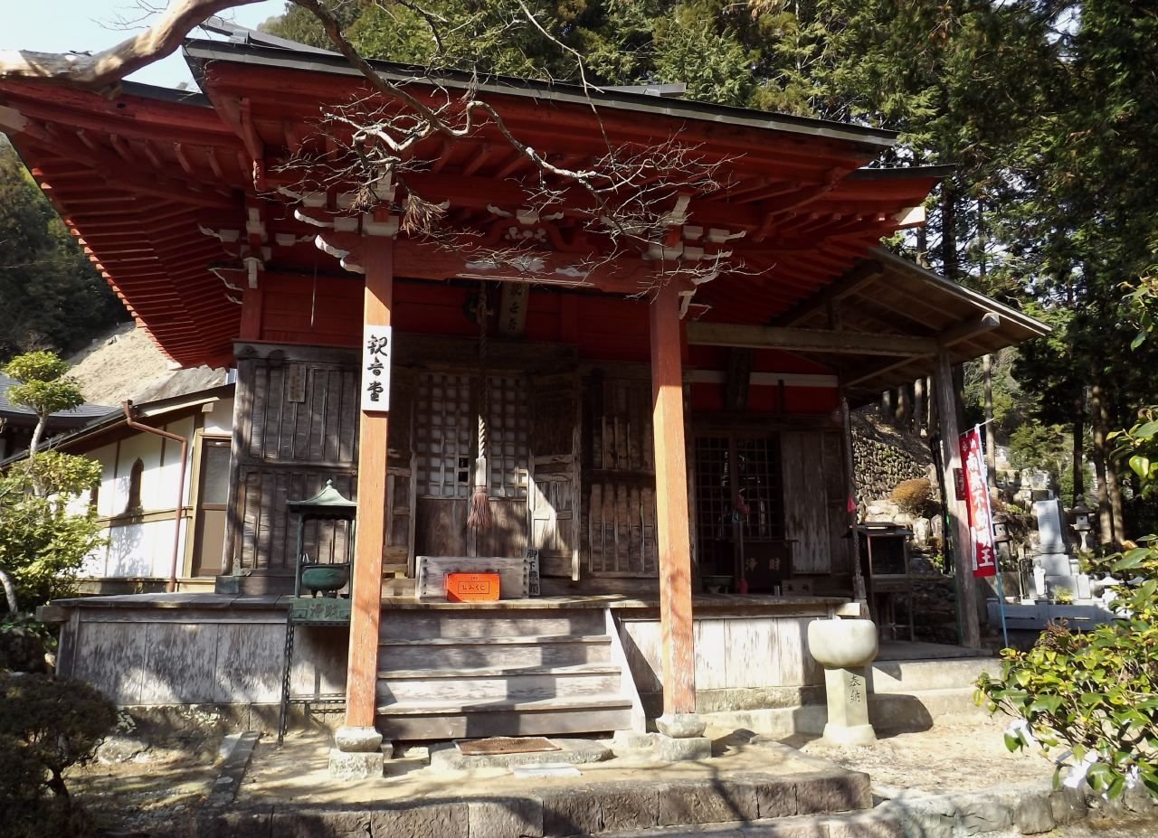 右側の不動堂と正面の観音堂が一体になっている